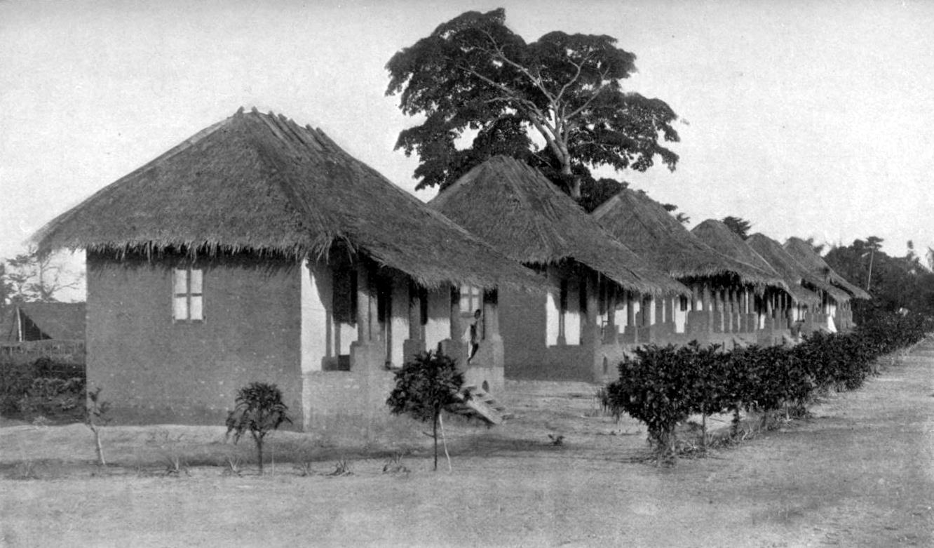 A Street in Coquilhatville, 1896 (Equateur) - p. 138